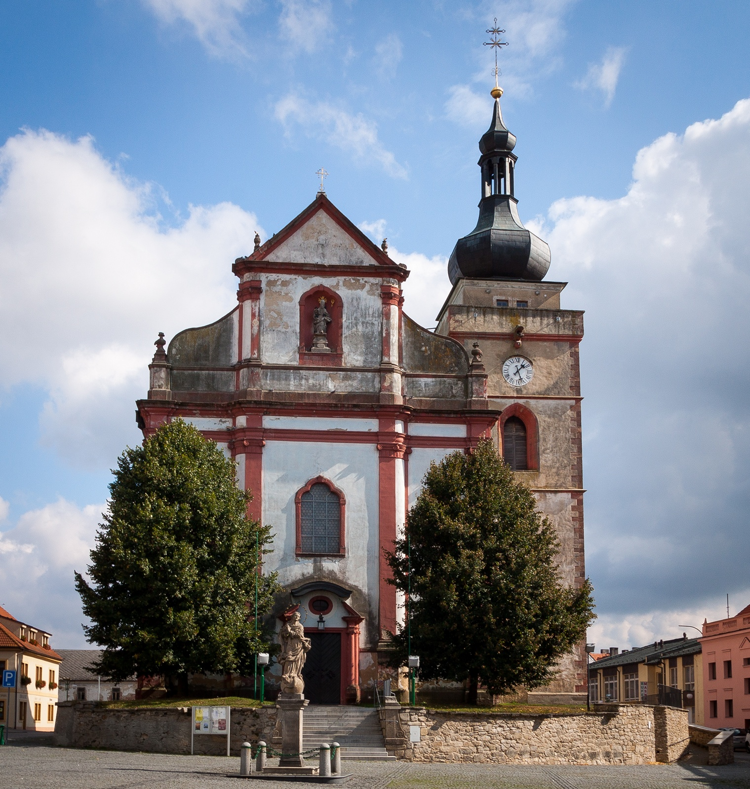 Kostel sv. Mikuláše (Bor), nám. Republiky 226, Bor